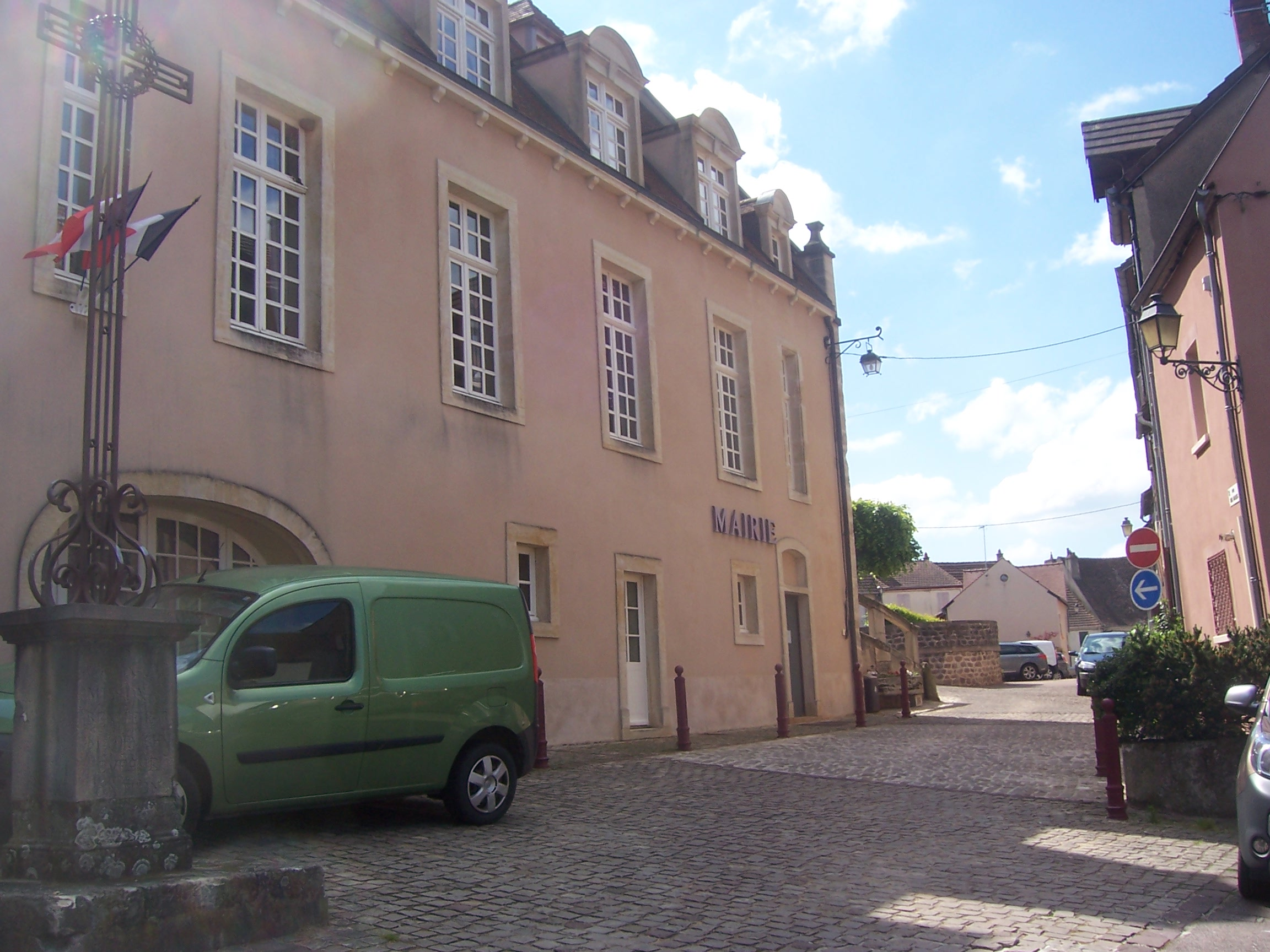 Mairie de Montcenis